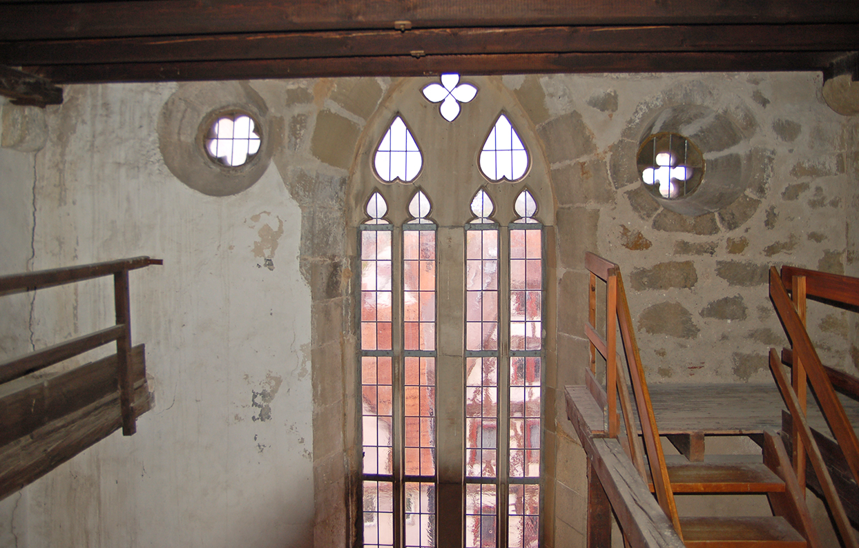 Westwerk-Fenster der Bartholomäuskirche in Markgröningen – im 19. Jhdt. eingebaut, Maßwerk historisierend.